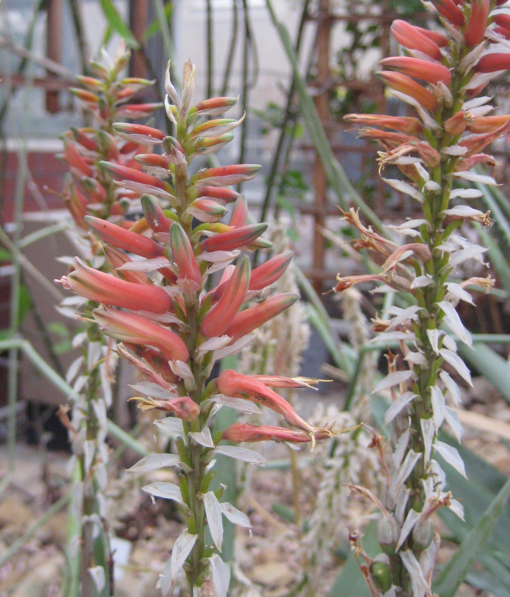 Aloe vacillans im Botanischen Garten Dresden